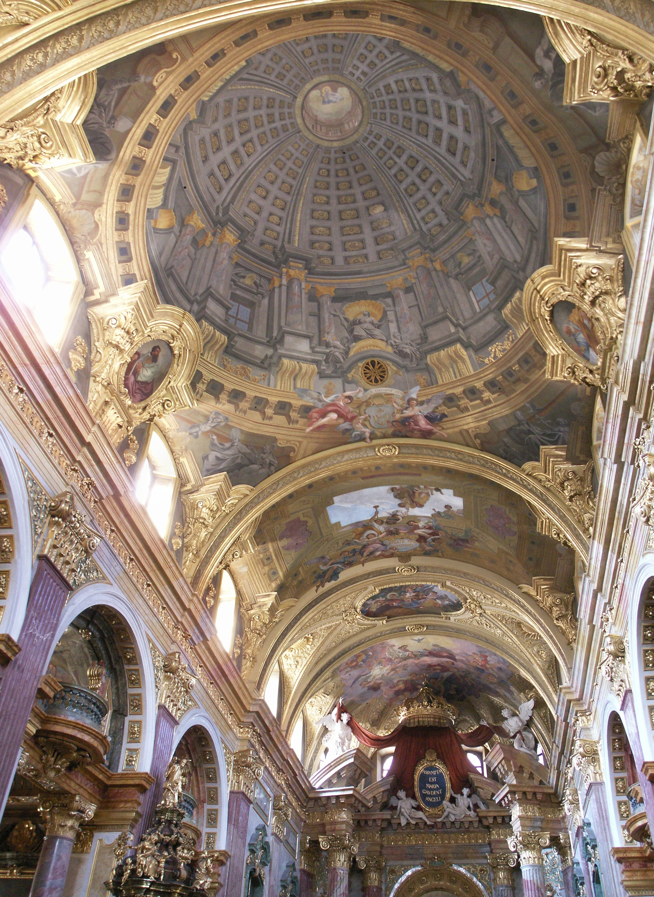 Jesuitenkirche, Wien (senkrechtes Panoramabild aus 2 Bildern)